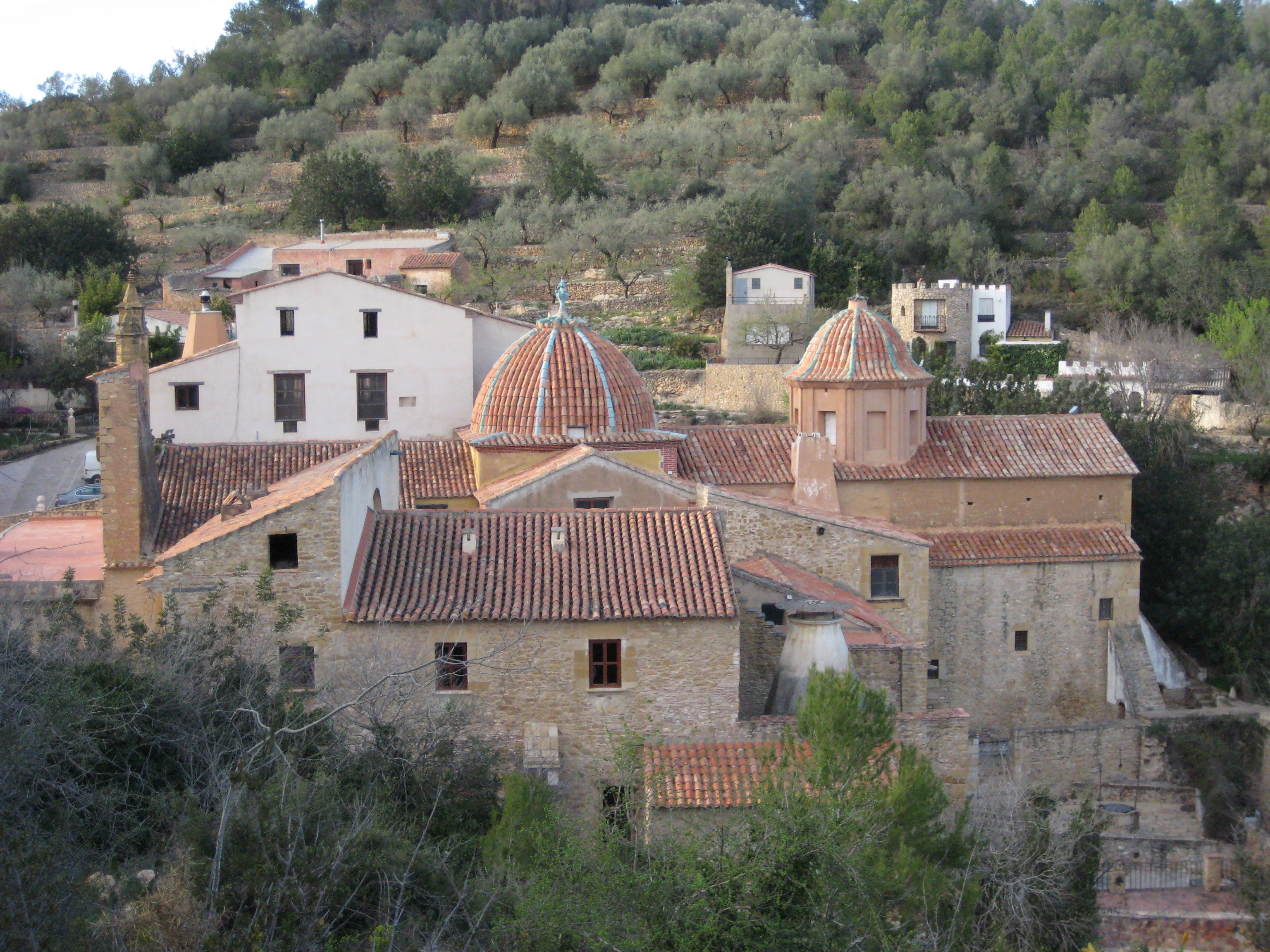 Vista general del Reial Santuari de la Mare de Déu de la Font de la Salut de Traiguera (Baix Maestrat)